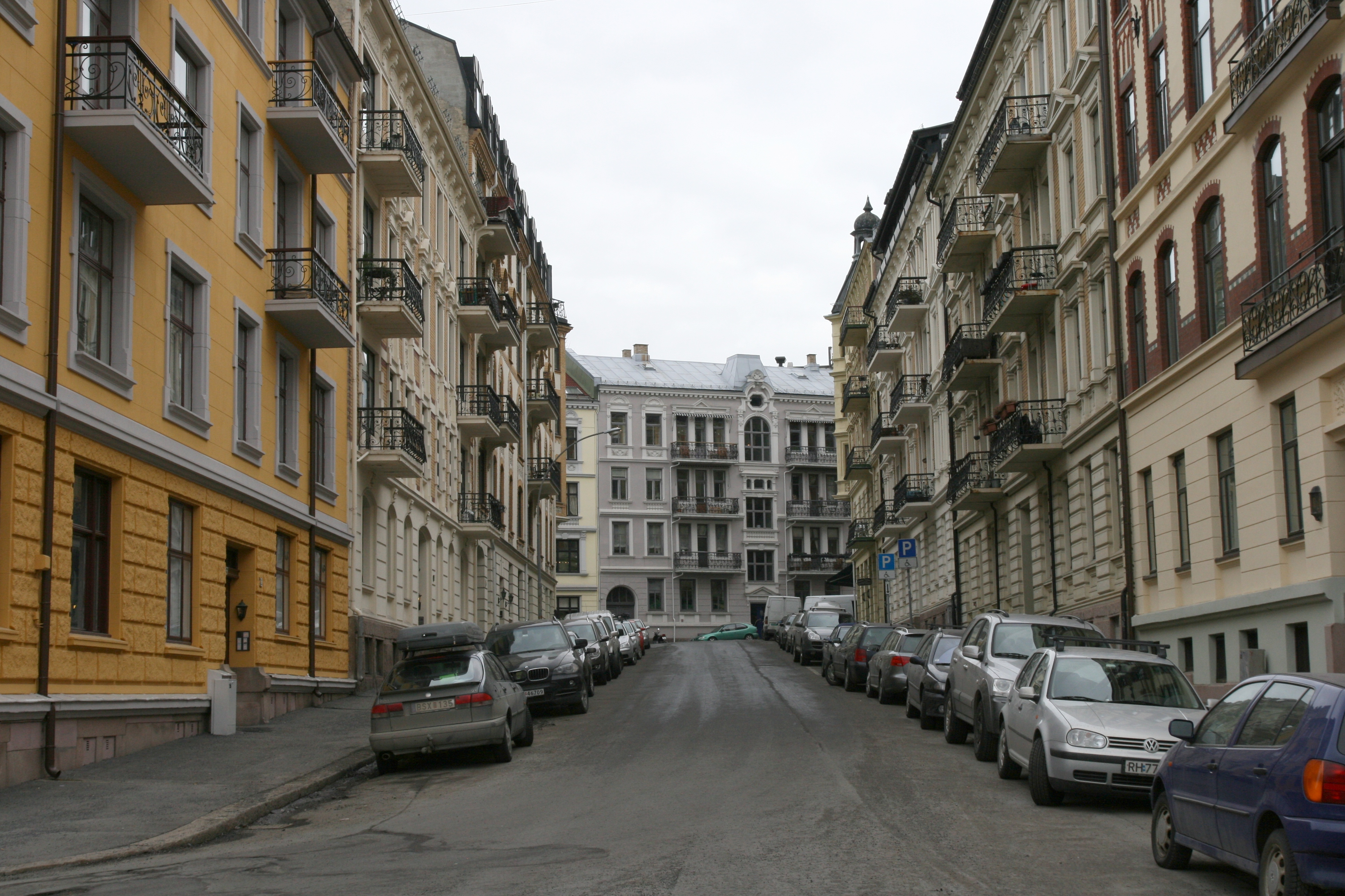 Tostrups gate på Frogner i Oslo. I enden av gaten ser man Elisenbergveien.